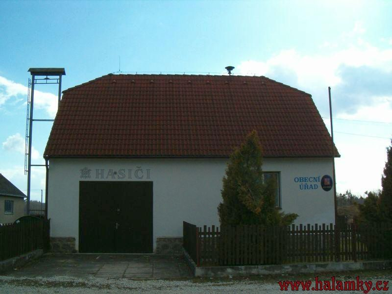 Halámky - Obecní úřad